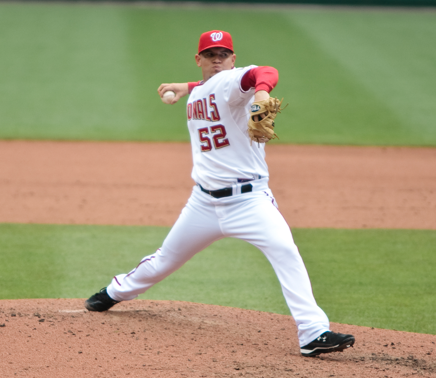 Saúl Rivera